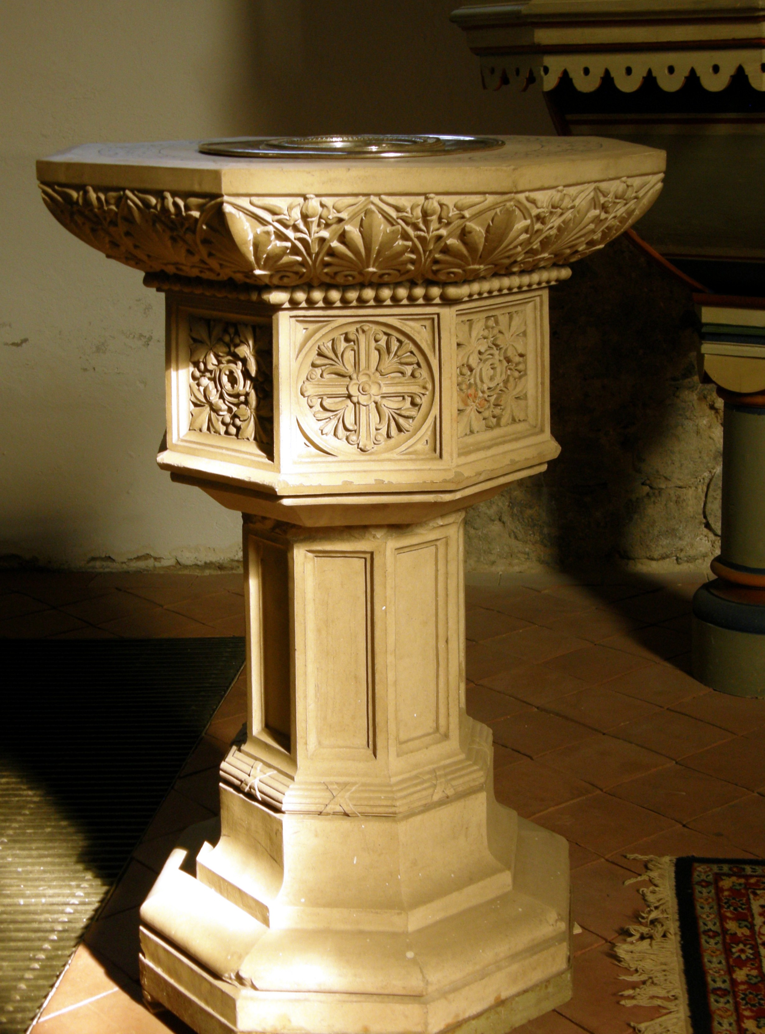 Berlin-Mahlsdorf, Hönower Str., alte Pfarrkirche, innen; Taufstein